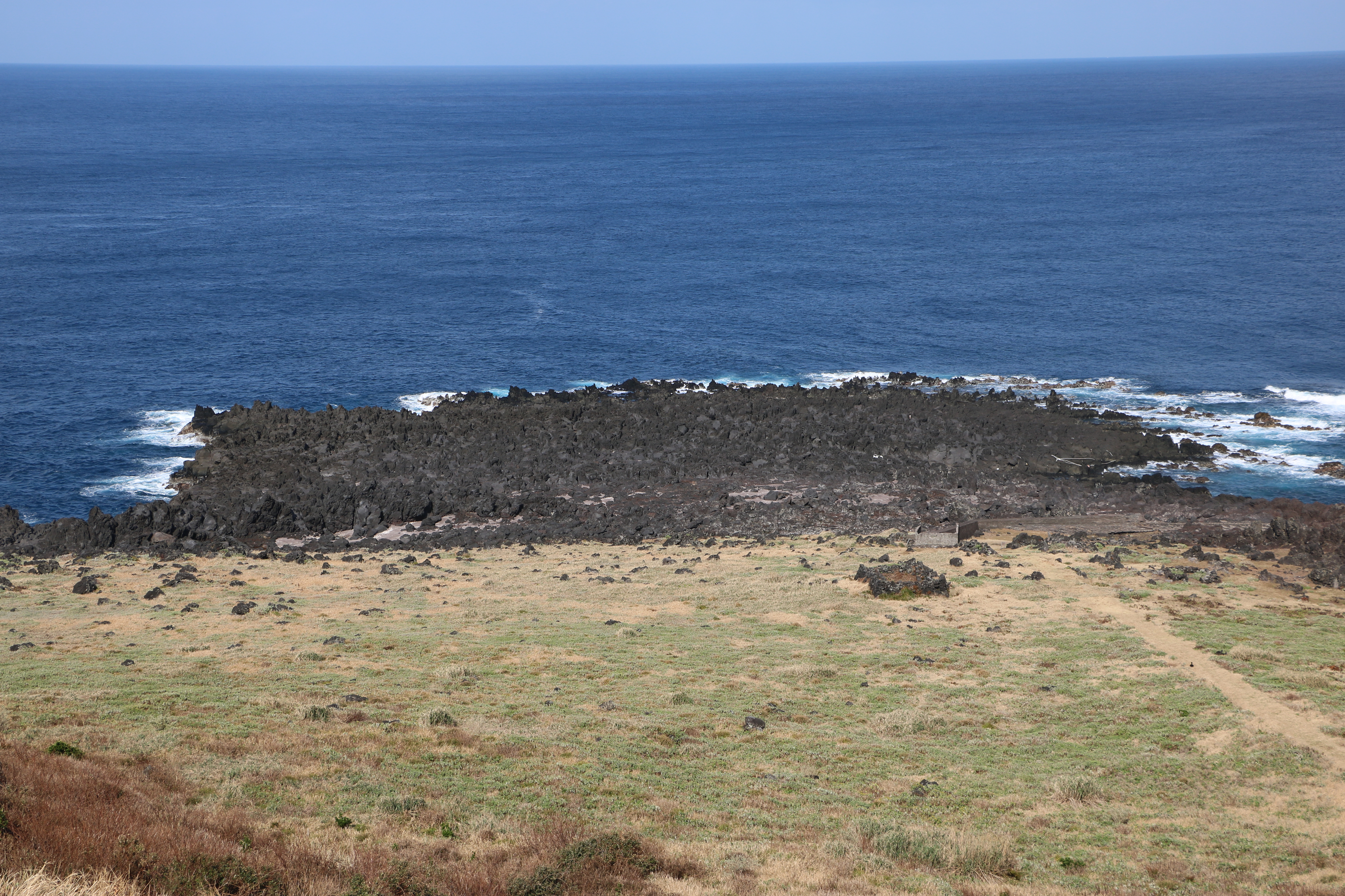 八丈小島鳥打地区から海方向を望む（東京都八丈町）